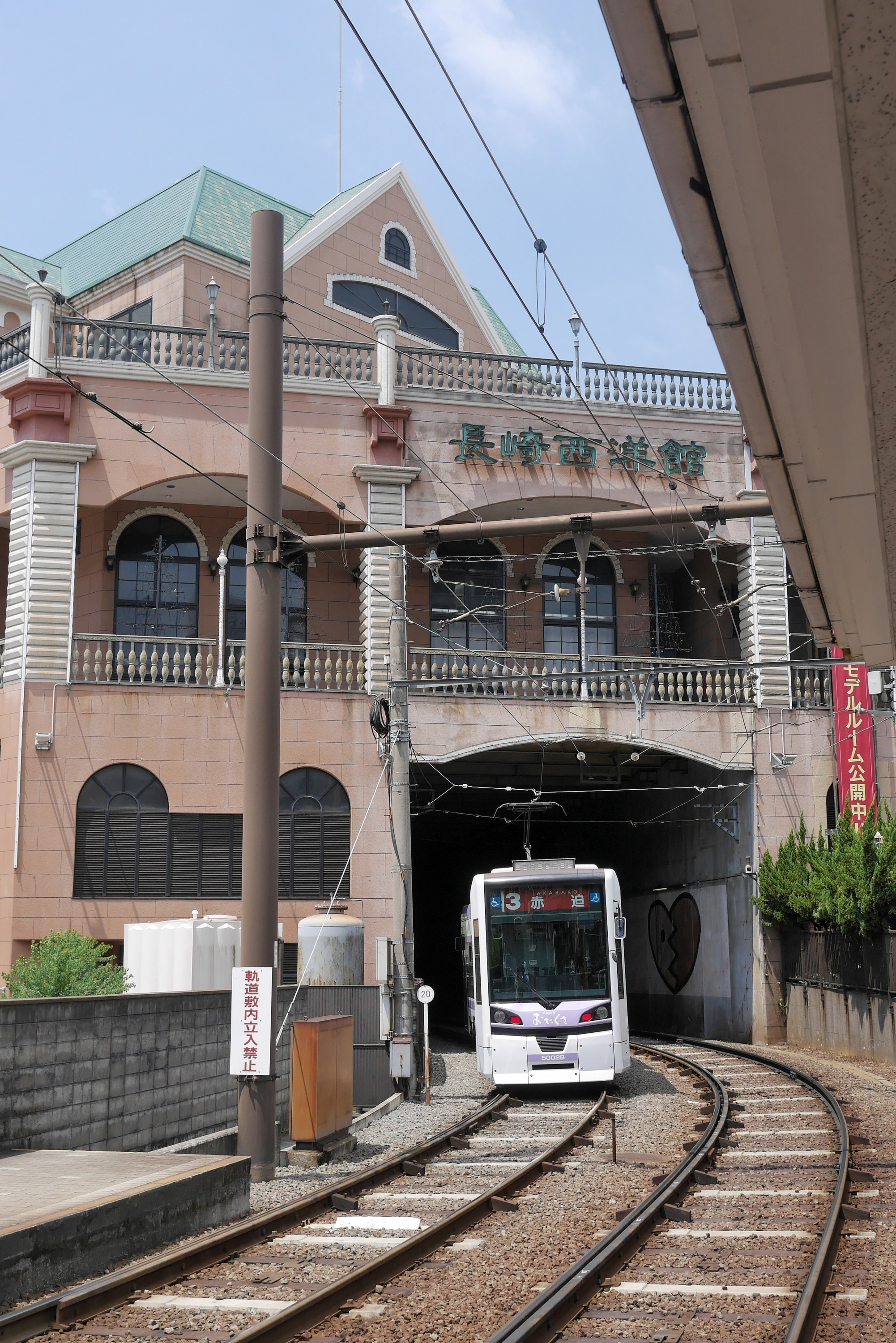 長崎電気軌道の原爆資料館停留場と同社の商業ビル・長崎西洋館（長崎県長崎市）。